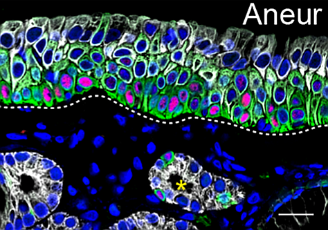 Fig. 1. Caracterización del epitelio olfativo humano. G), Inmunotinción para CK5 y p63. Las células ubicadas tanto en los acinos compactos como en los conductos expresaron CK8; unas pocas células negativas para CK8 ubicadas en la capa externa de las glándulas de Bowman expresaron CK5 y p63. Se realizó inmunotinción CK8 y se usó Dapi como contratinción nuclear. Barra de escala= 100 μm.